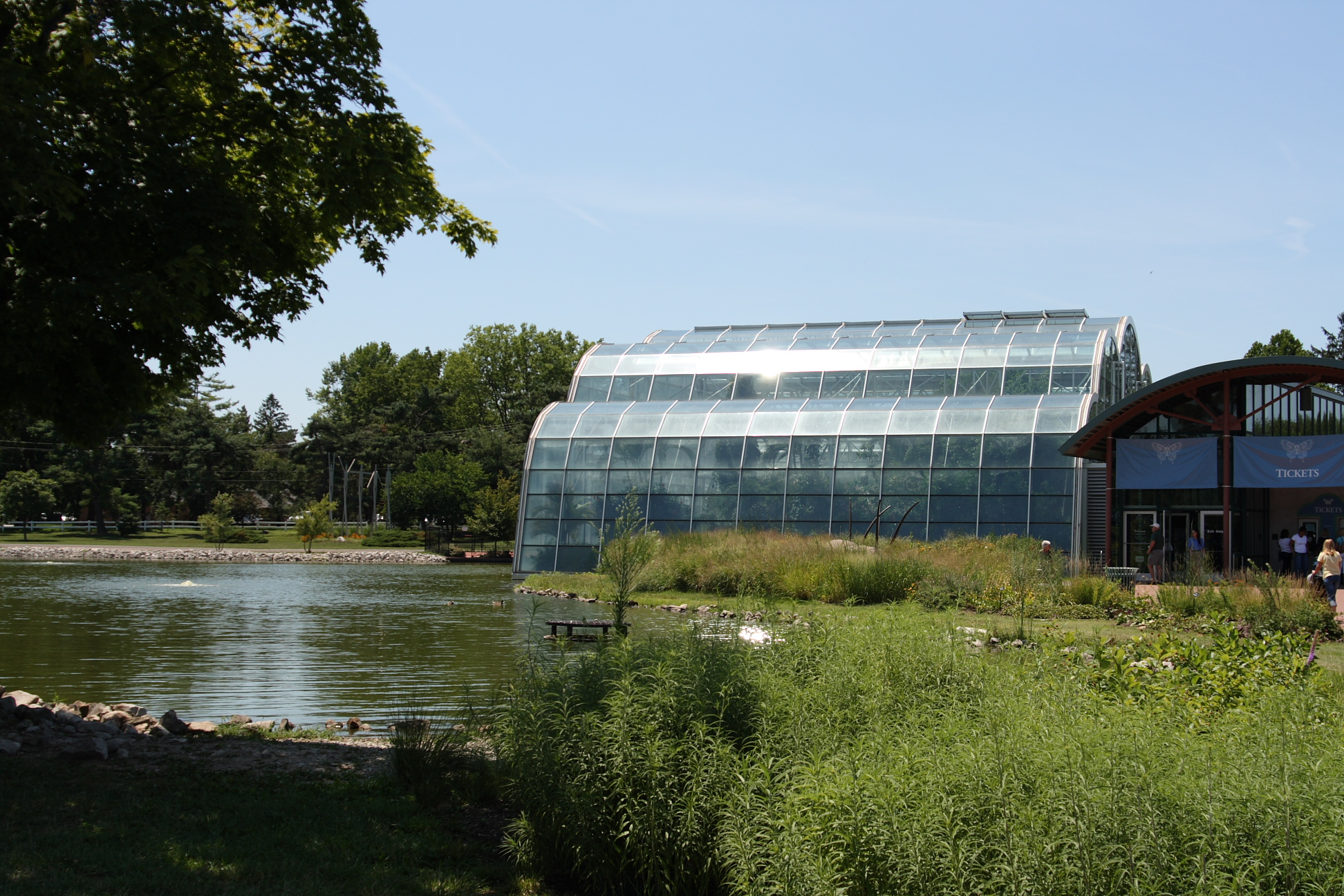 DPP_0006